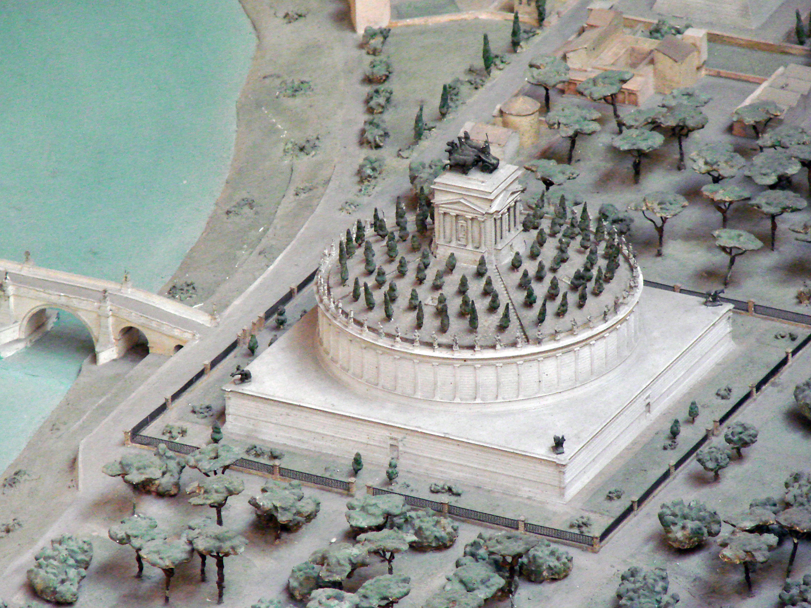 Le mausolée d'Hadrien (132-139) L'Empereur Hadrien construisit pour lui et ses successeurs, vers 130, le Mausolée connu aujourd'hui sous le nom de Château Saint-Ange. Il était composé d'un soubassement carré de 90 m de coté et de 15 m de haut, surmonté d'un tambour cylindrique. La partie supérieure était recouverte de terre et de cyprès. La partie supérieure et la fortification datent du Moyen-Âge. Il a été transformé en résidence pontificale à partir du XVème siècle. Article de Wikipedia